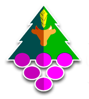 Escudo de la comuna de Galvarino.